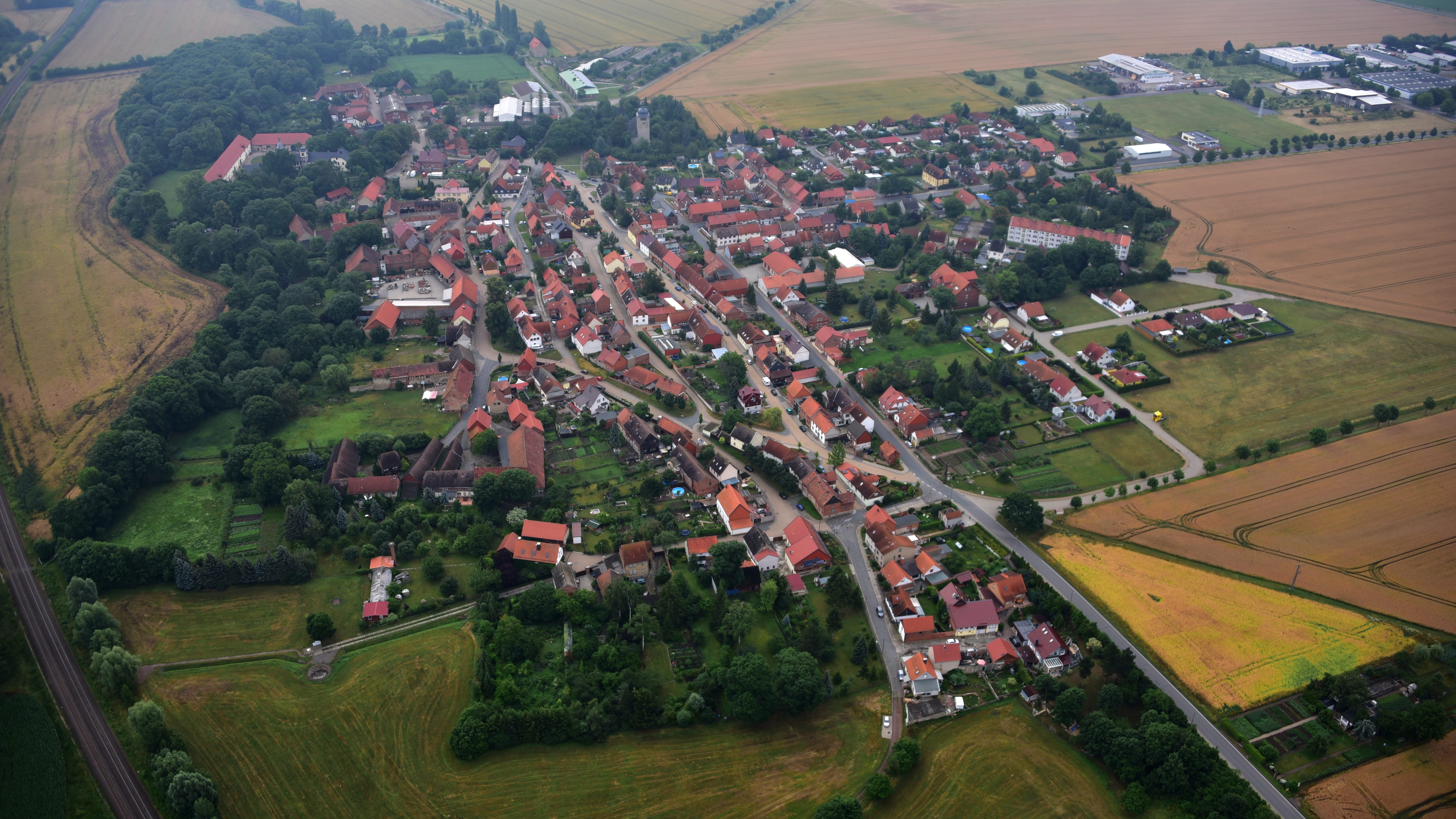 Emersleben, Luftaufnahme (2017)